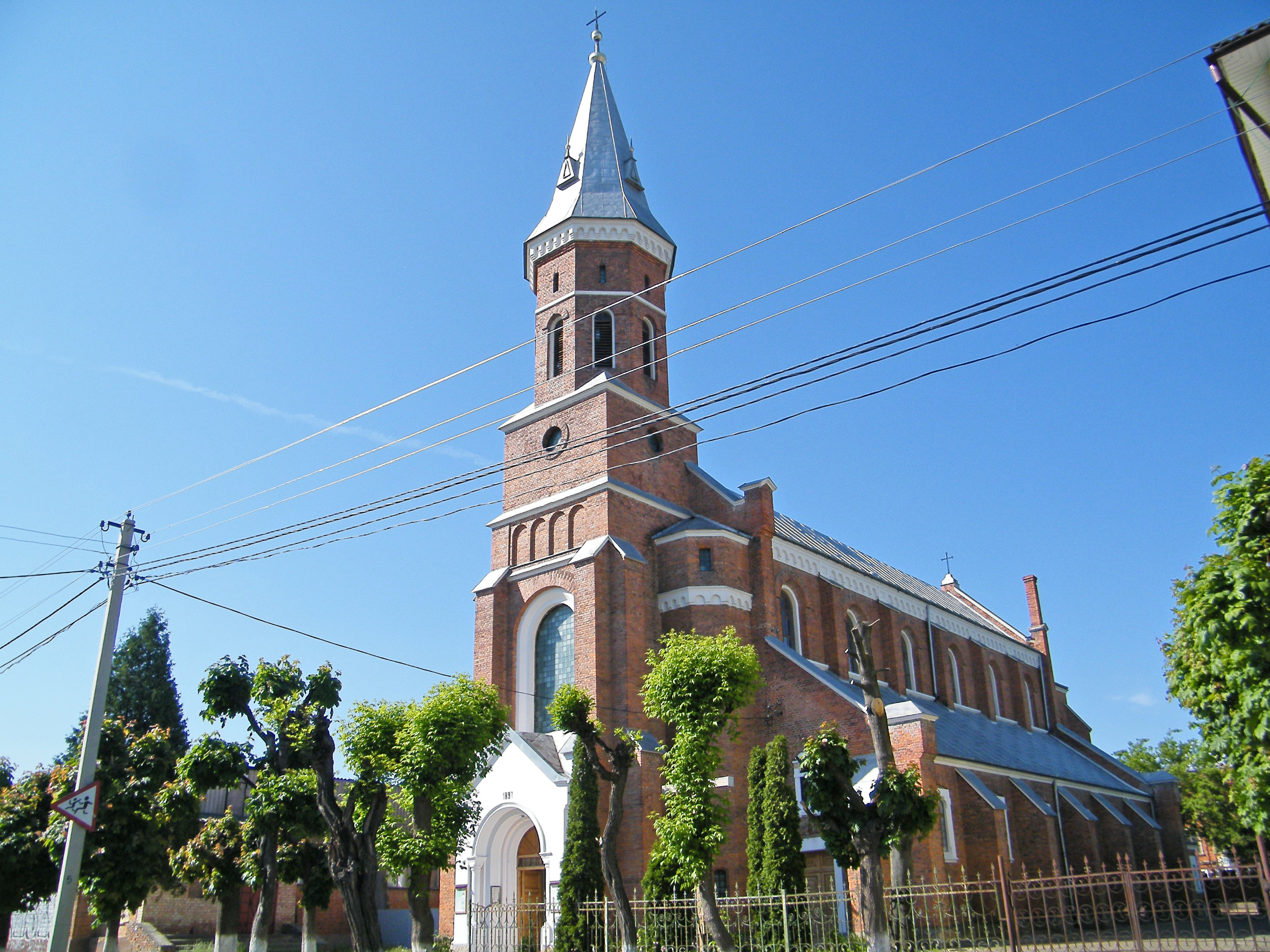 Костел Игнатия Лойолы.